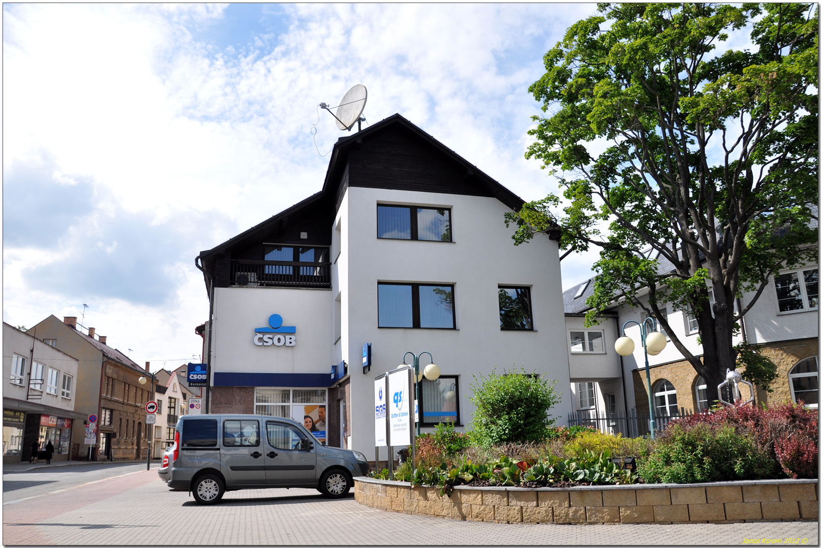 Pobočka ČSOB v Nové Pace, Komenského 304